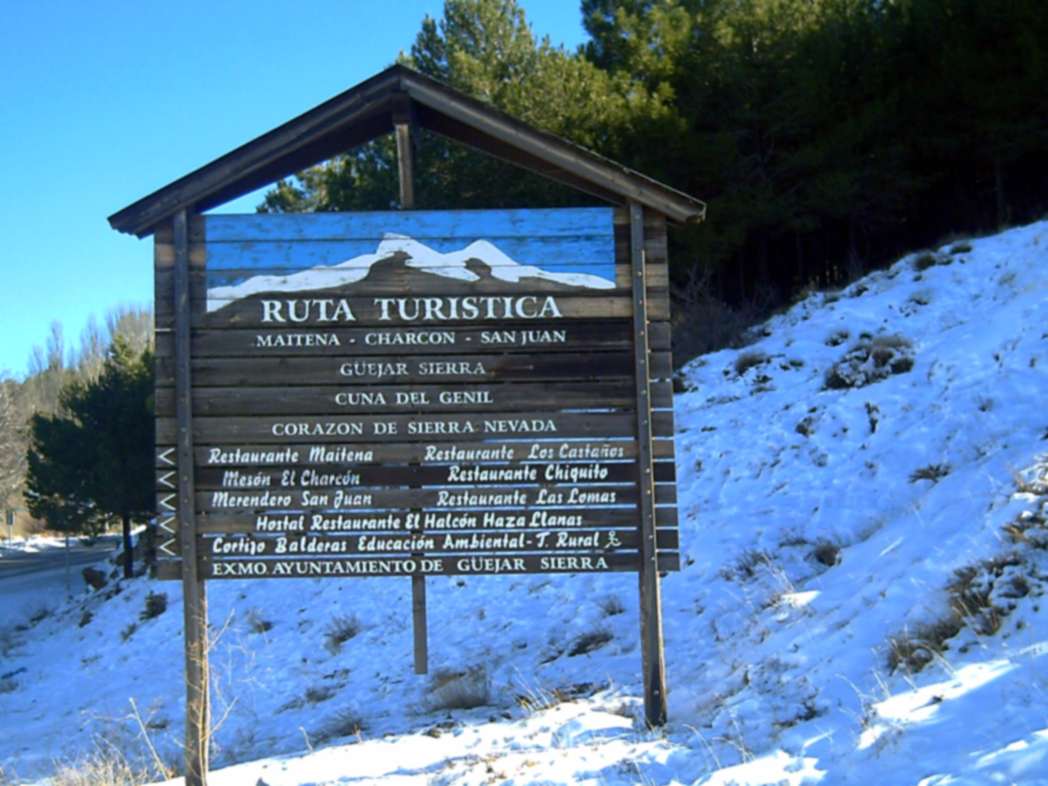 Dornajo in Sierra Nevada (Granada, Spain)